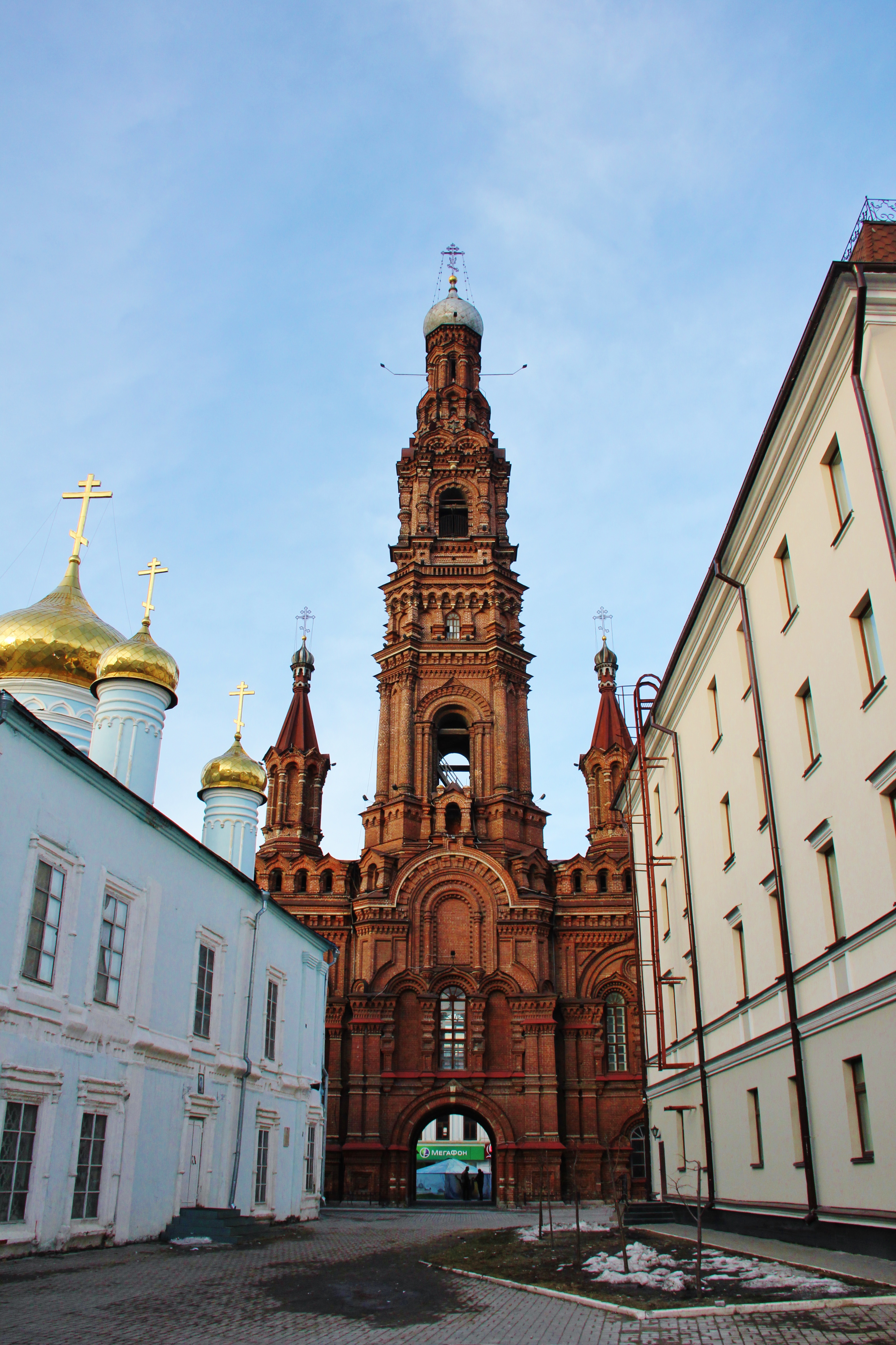 колокольня Богоявленского собора. г.Казань